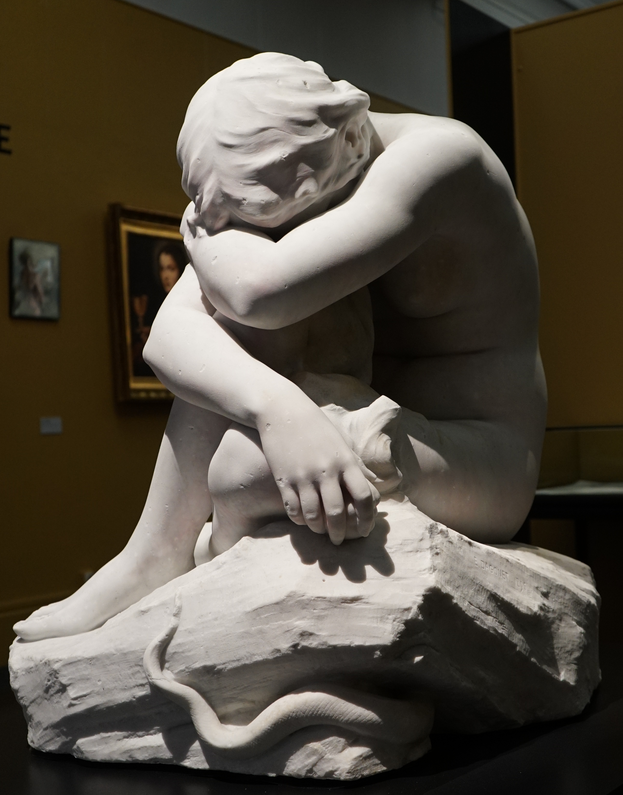 lors d'une exposition temporaire.